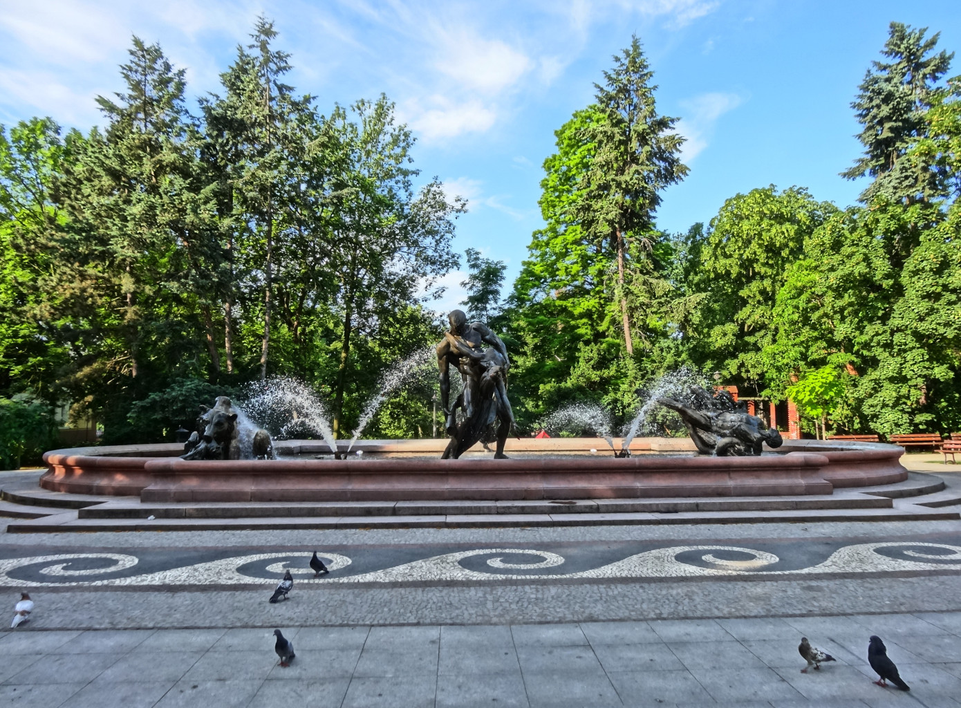 Fontanna Potop w Bydgoszczy rekonstruowana od 2006 roku